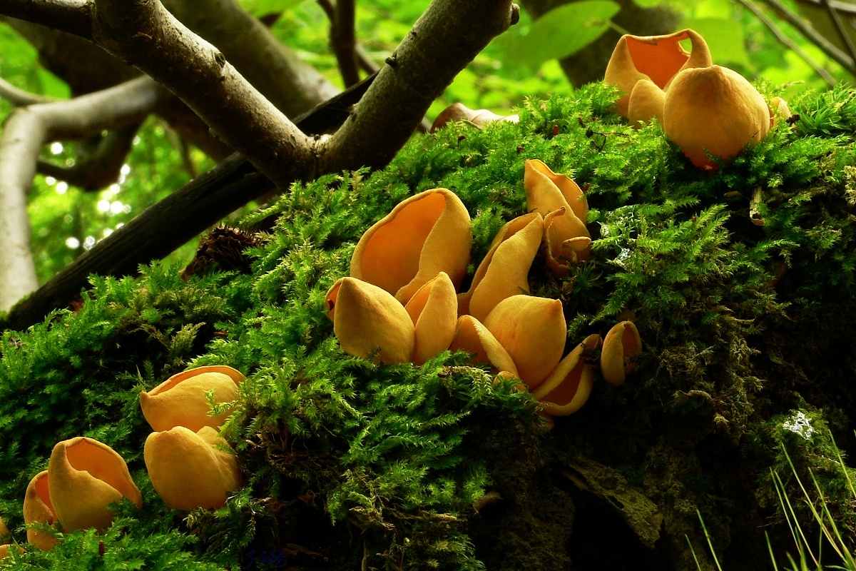 Eselsohren, Otidea onotica